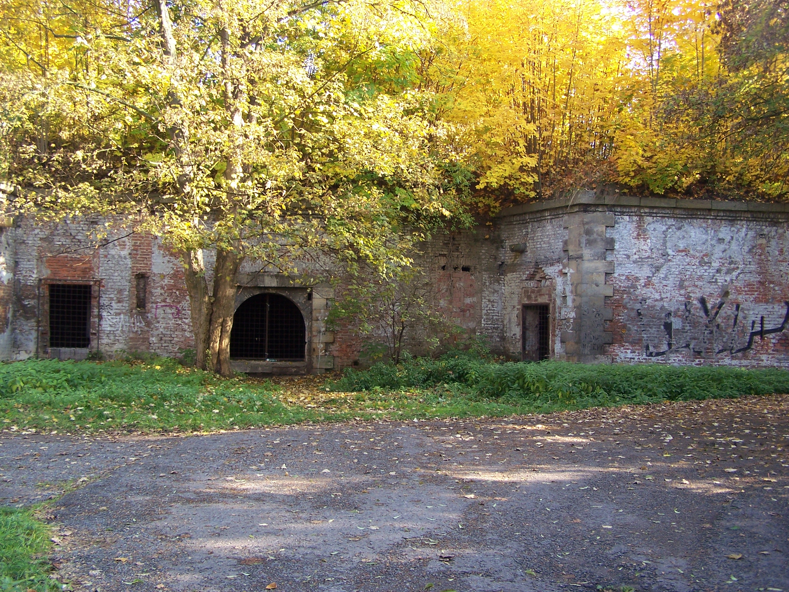 Pevnost Flošna Pajkrova (Hradec Králové), Z od Brněnské 167, Hradec Králové